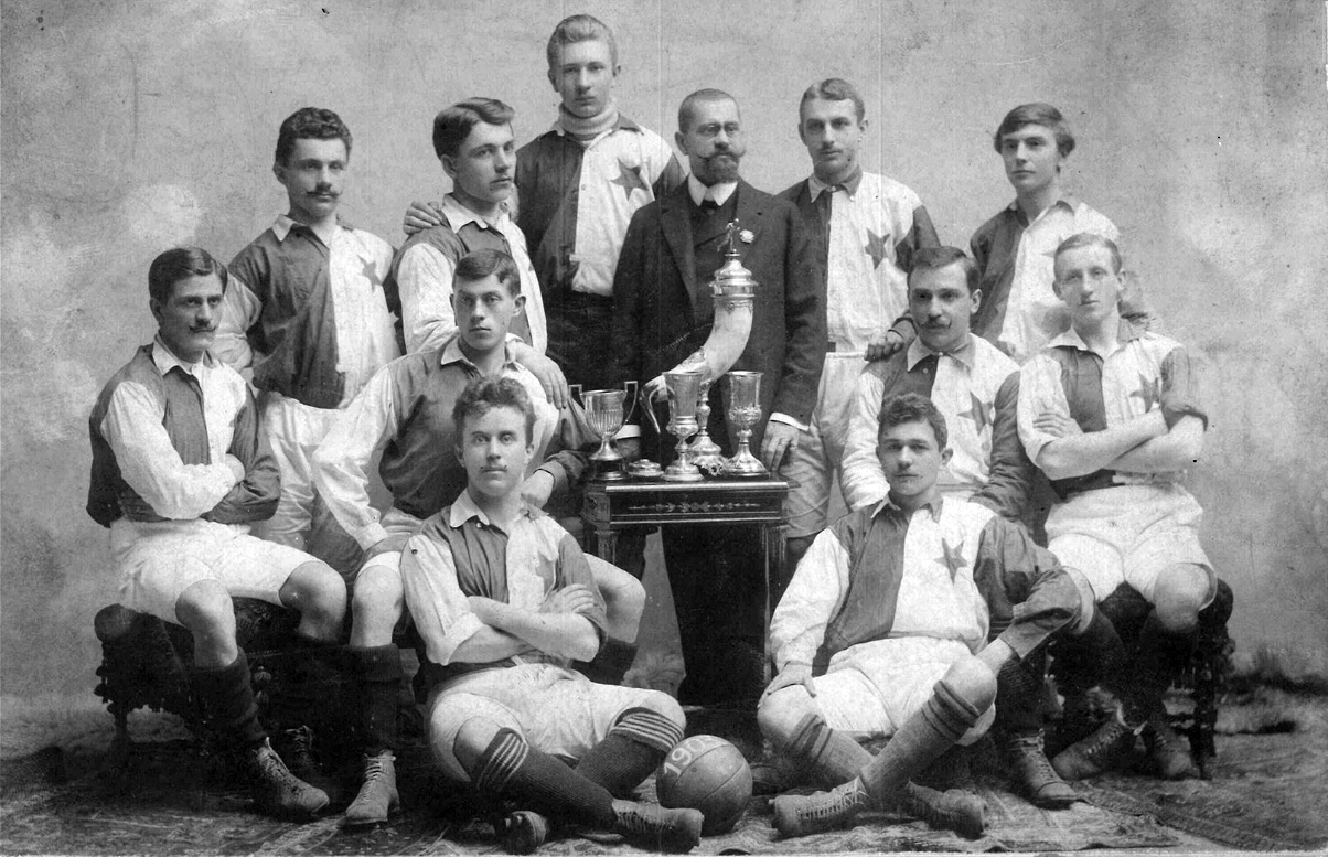 Rok 1903. Do Slavie přichází kanonýr Jan Košek, první český fotbalista jehož věhlas byl mezinárodní. Horní řada zleva: A. Pressler, Hrabě, Hejda, Dr. Práchenský, Žabokrtský, Veselý. Prostřední řada zleva: Krummer, J. Benda, Setzer, Košek. Dolní řada: Baumruk, Vaněk.